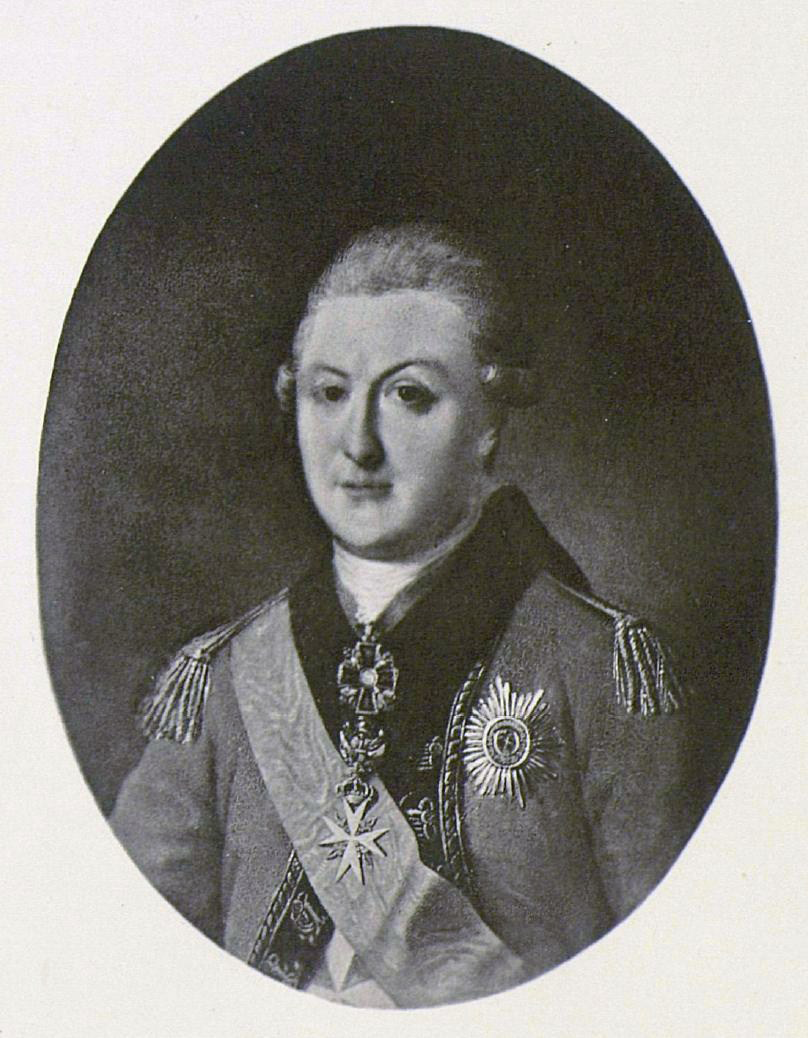 Kniaz' Pavel Gavrilovich Gagarin, 1777-1850